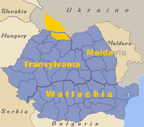 Entire Maramures